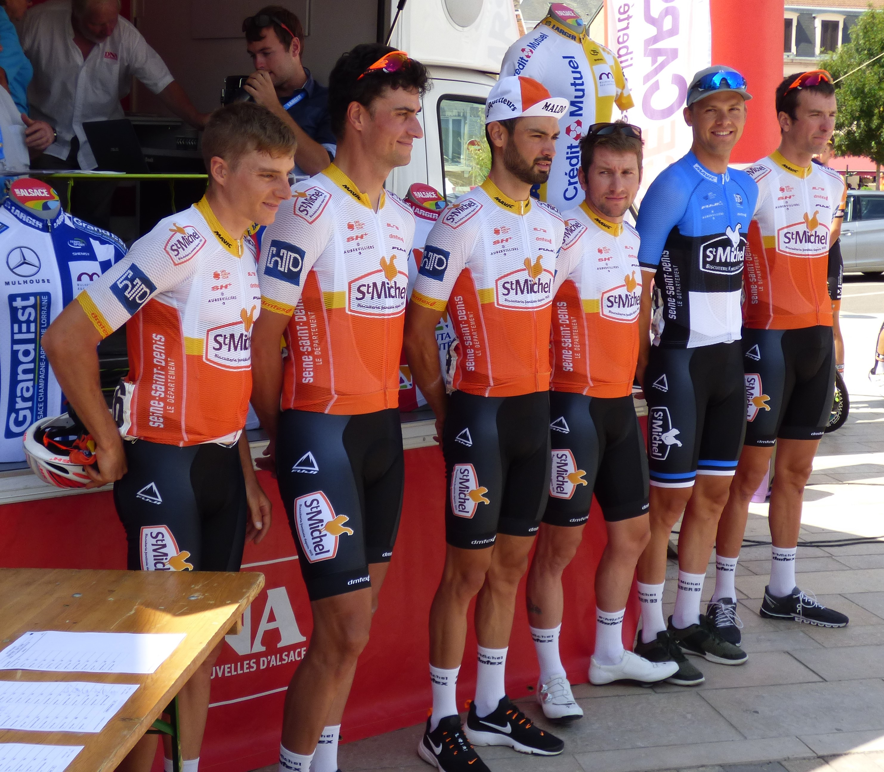 Tour Alsace 2019 - Présentation de l'équipe Saint Michel-Auber 93 au départ de la troisième étape à Vesoul Depicted people: Tony Hurel, Nicolas Baldo, Alo Jakin, Anthony Maldonado, Yoann Paillot and Camille Thominet